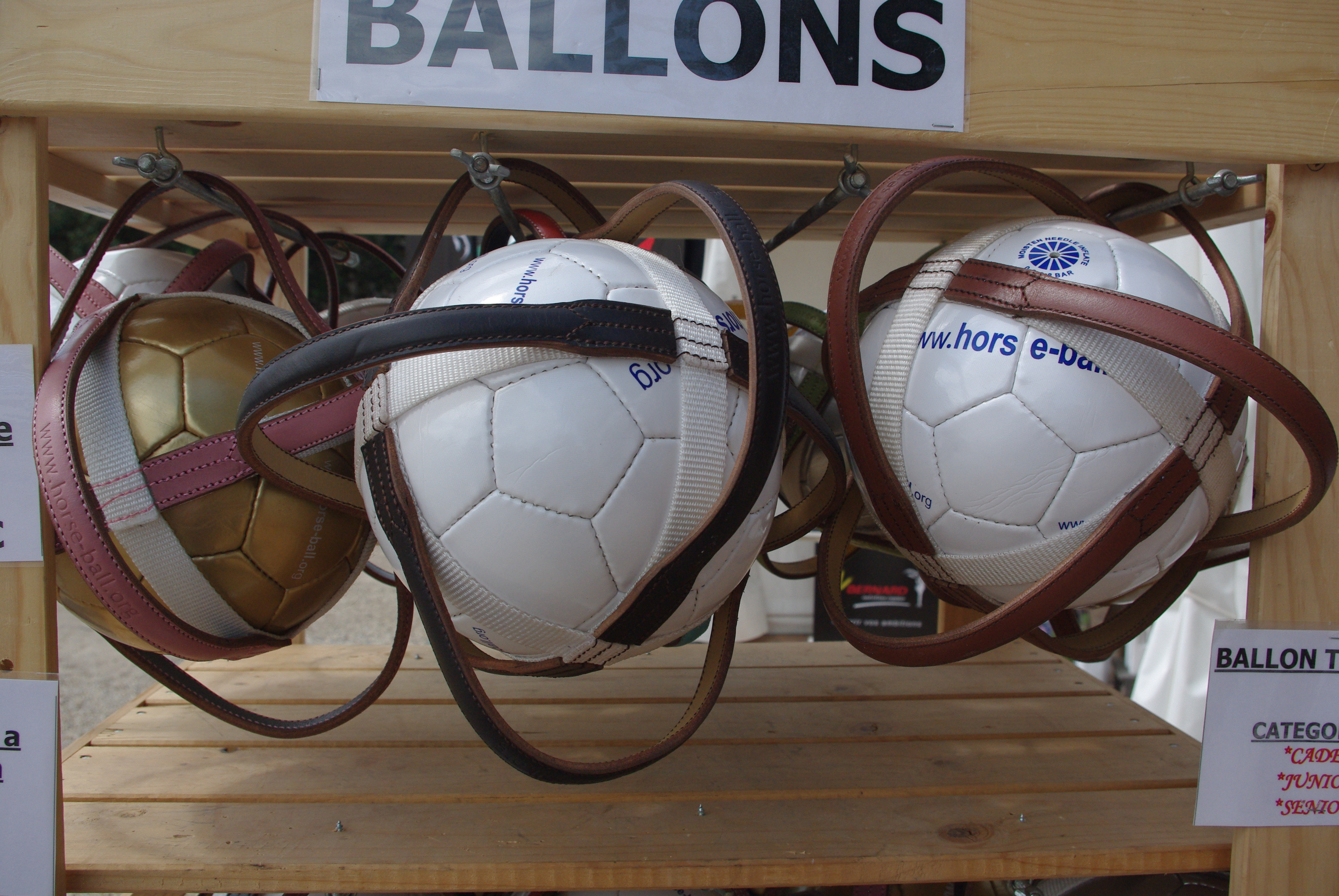 Ballons de horseabll aux championnats de France de horseball féminin, Cluny.